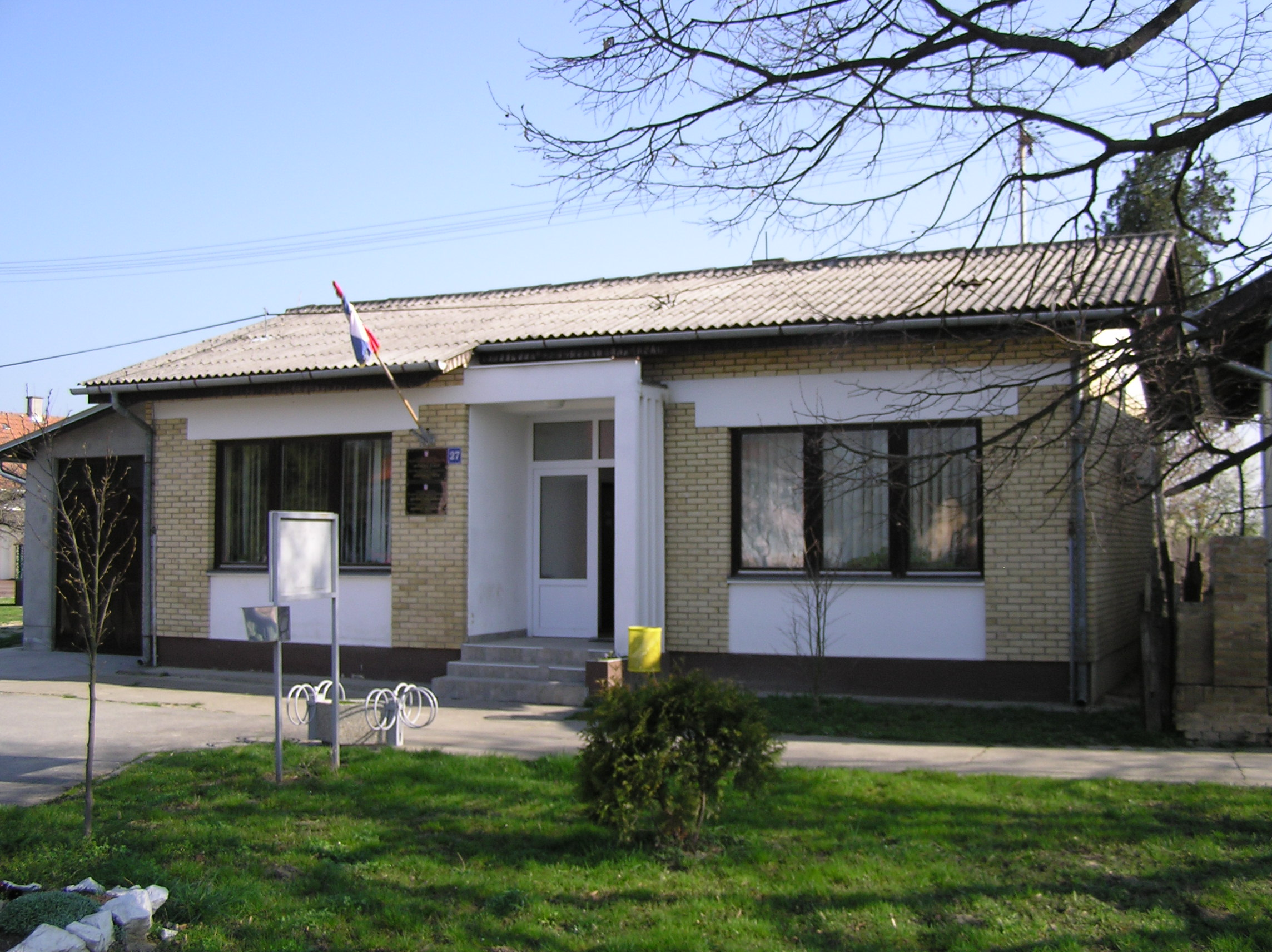 A kép a baranyabáni községházát ábrázolja.